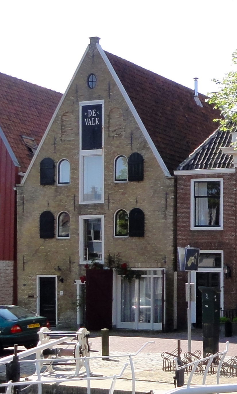 Rozengracht 10 "De Valk" in Harlingen